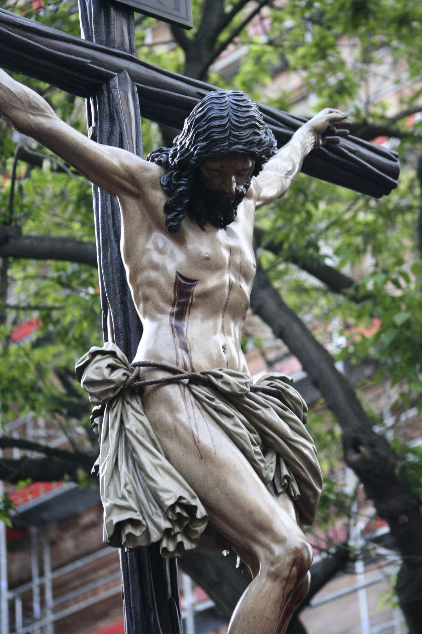 Cristo de la Buena Muerte. Semana Santa en Sevilla. Año 2006 Foto realizada y propiedad de Ángel Cachón